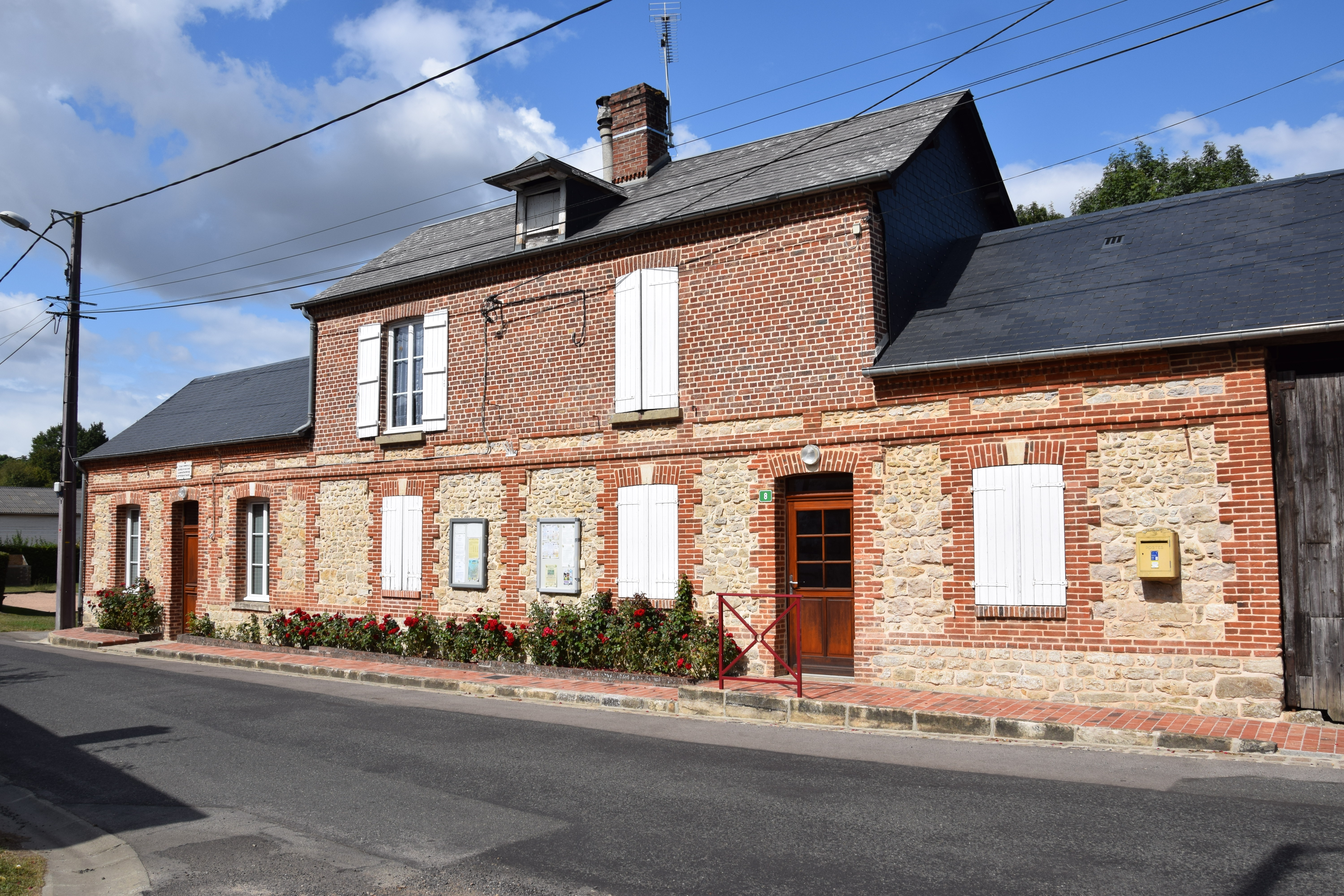 Buicourt mairie